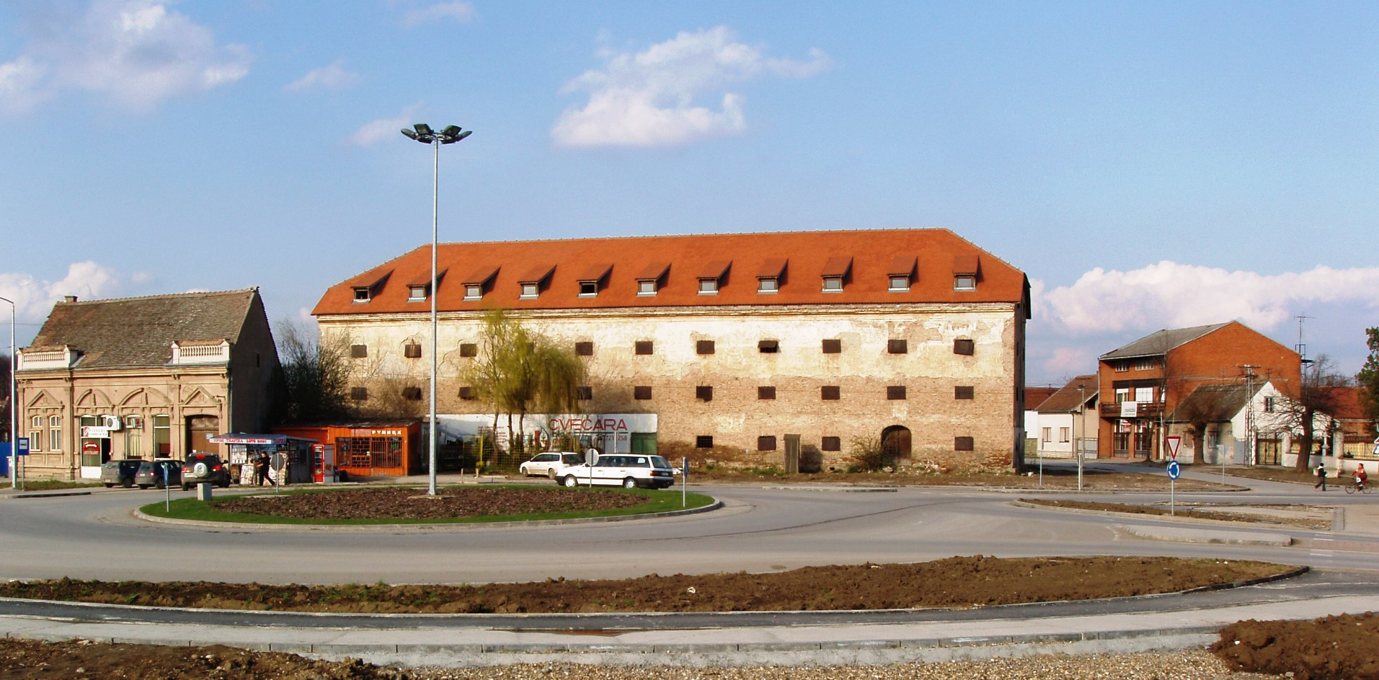 Сремска Митровица